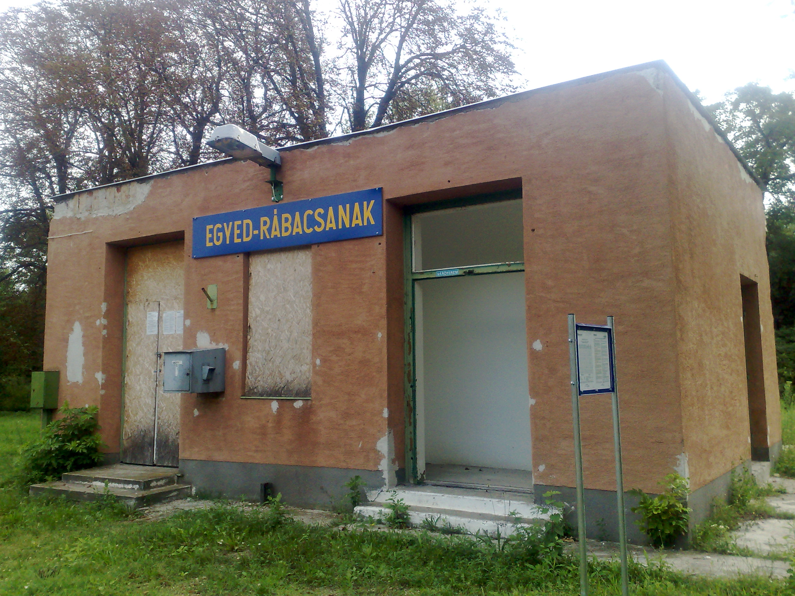 Vasútállomás Egyed-Rábacsanak